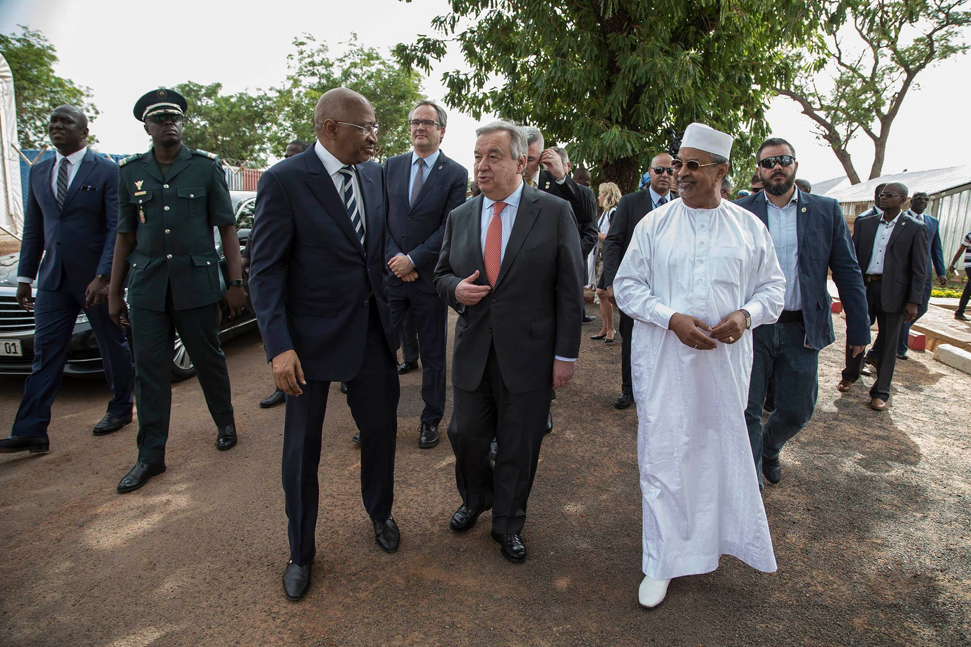 Le secrétaire général de l'ONU, Antonio Guterres, en compagnie du Premier ministre du Mali, Soumeylou Boubèye Maïga (à g.), le 29 mai 2018, à Bamako